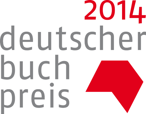 Logo Deutscher Buchpreis 2014